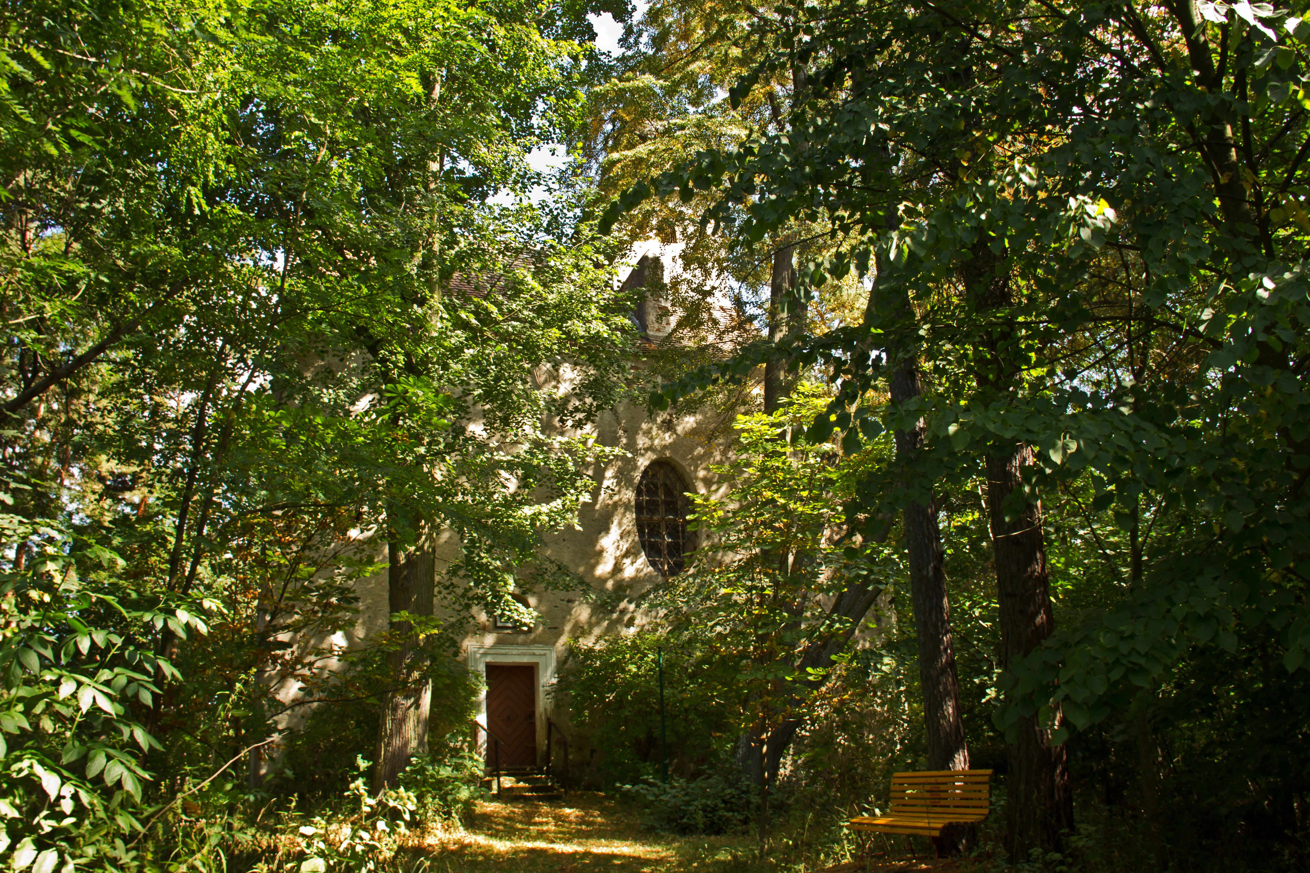 Turmartige Kapelle mit romanischem Baukern, nahe der alten Burg Liebenberg.